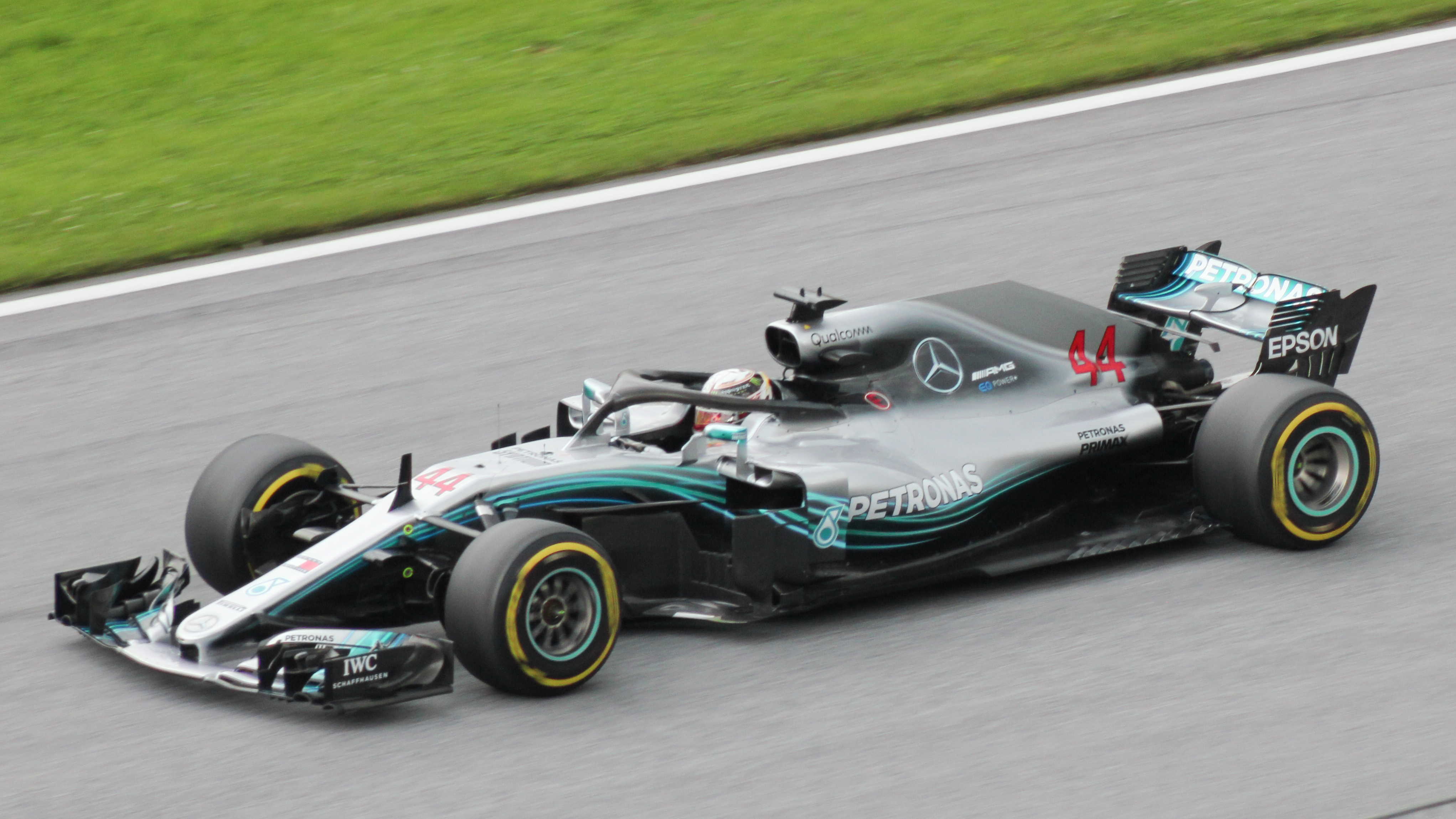 44 Hamilton beim Rennwochenende in Österreich 2018